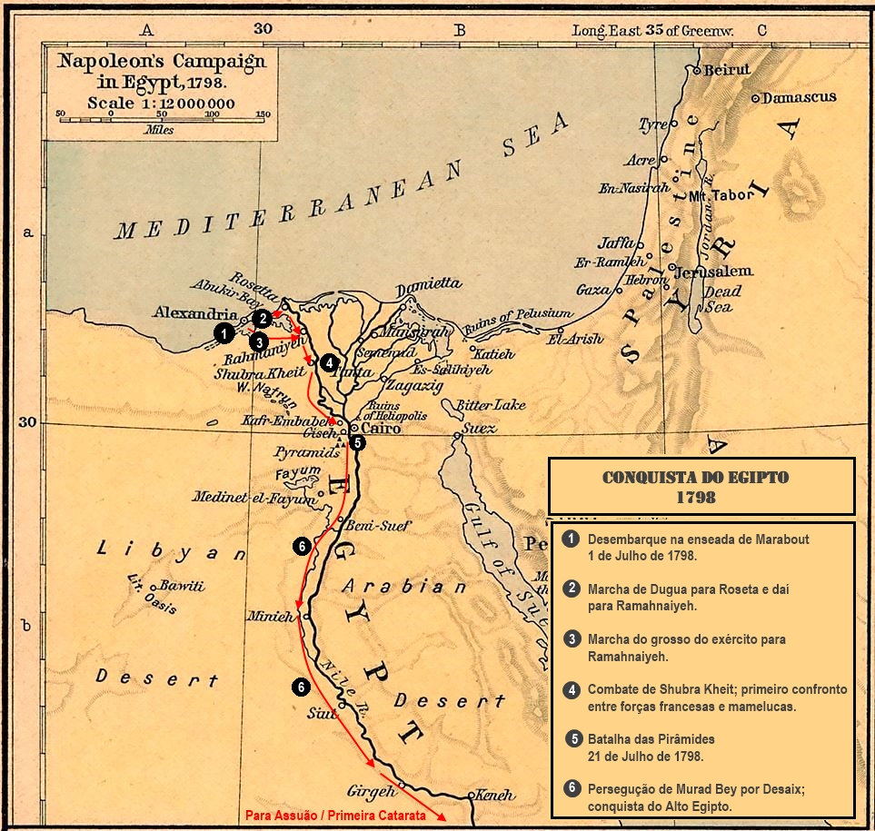 Mapa do Egipto com a indicação dos principais movimentos dos Franceses durante a conquista do território.